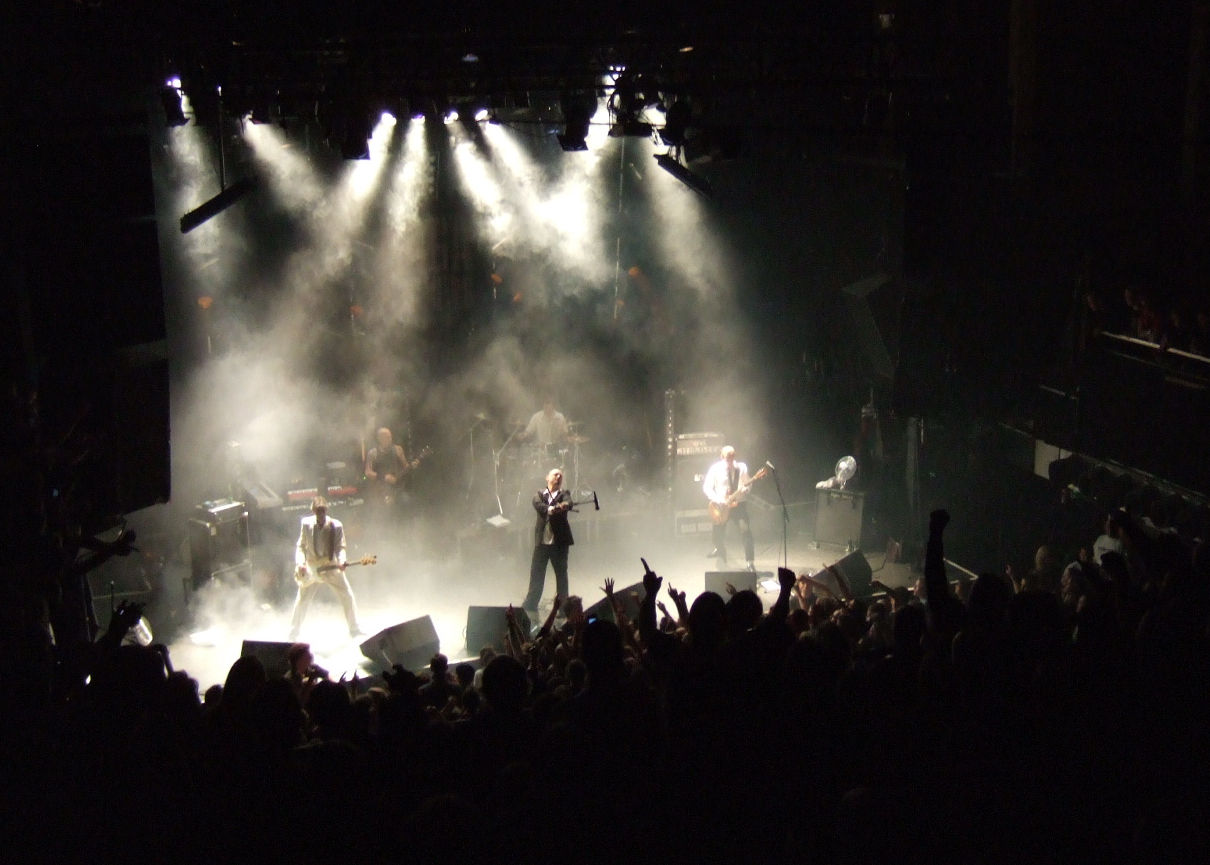 Raga Rockers, Rockefeller, Oslo